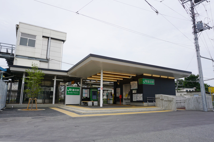 番田駅（神奈川県相模原市中央区上溝378）